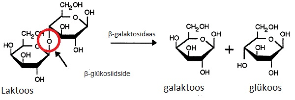 Reaktsioon, mis iseloomustab laktoosi hüdrolüüsi beta-galaktosidaasi katalüüsil